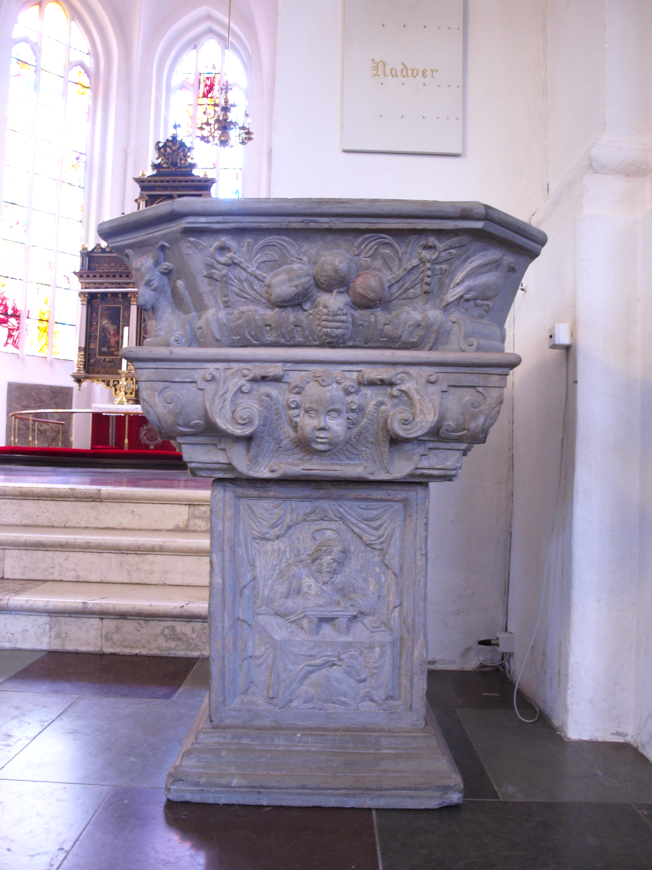 Døbefont i Sankt Nikolai Kirke (Kolding)